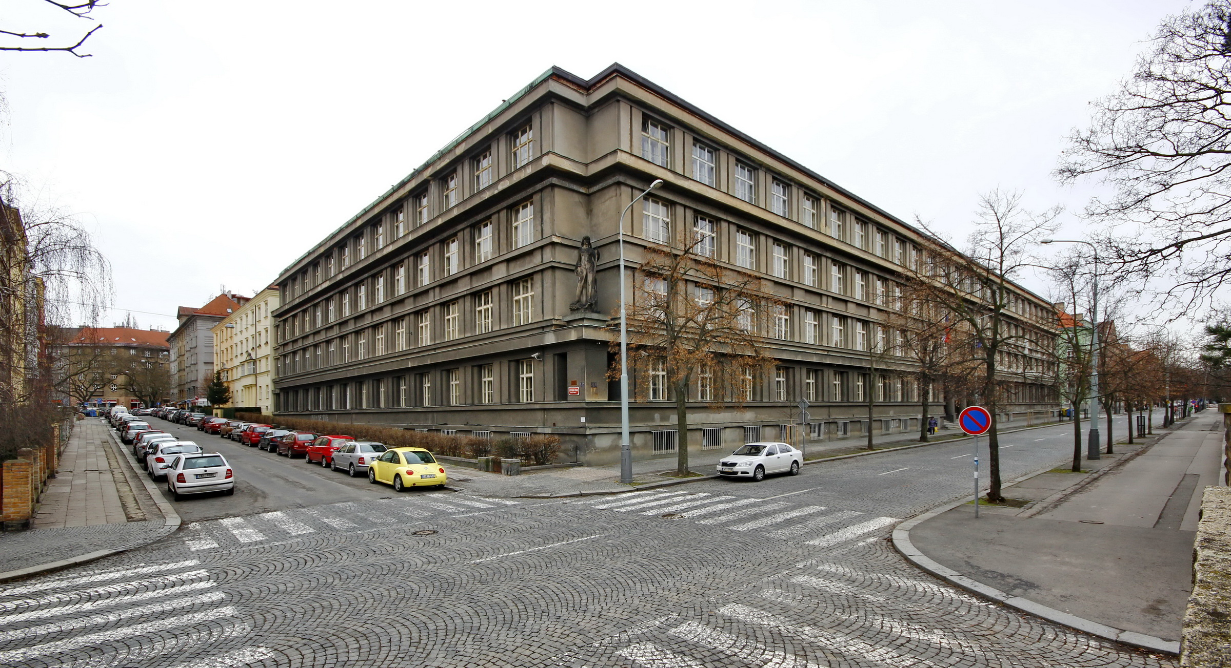 Praha 6 - Bubeneč, Vojenský zeměpisný ústav, architekt Bedřich Feuerstein, 1921-1925